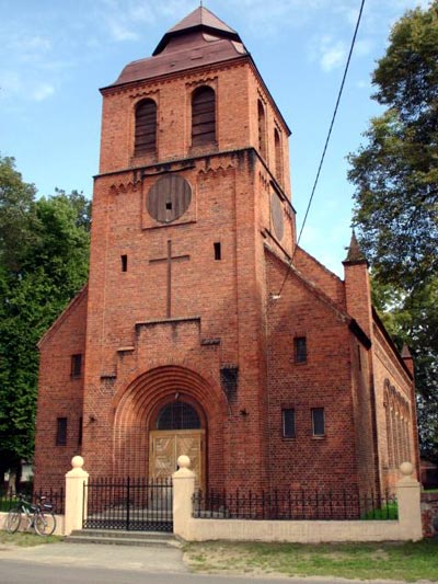 Białków - kościół pw. św. Andrzeja Boboli